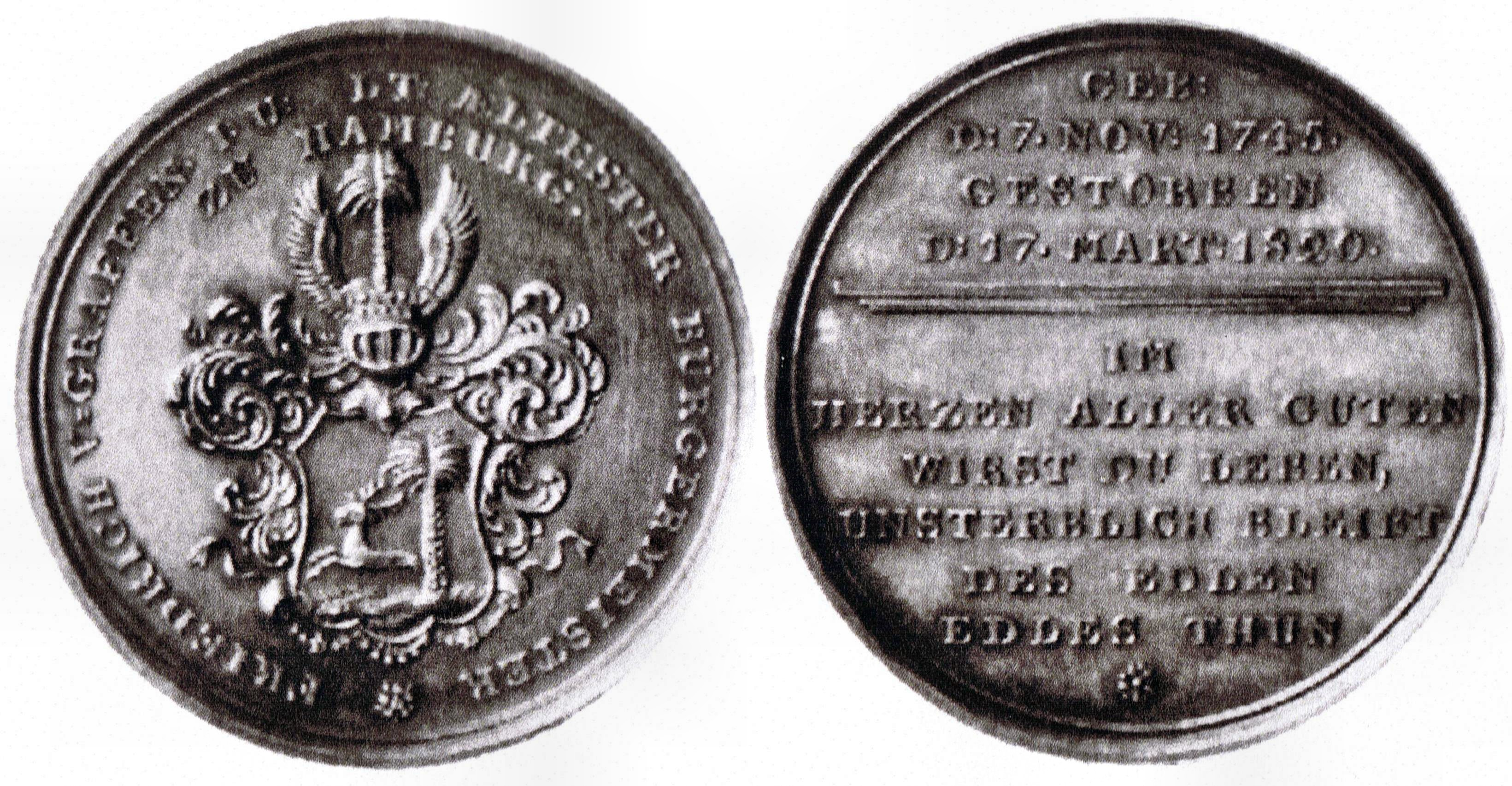 Medaille der Stadt Hamburg anläßlich des Todes von Friedrich von Graffen